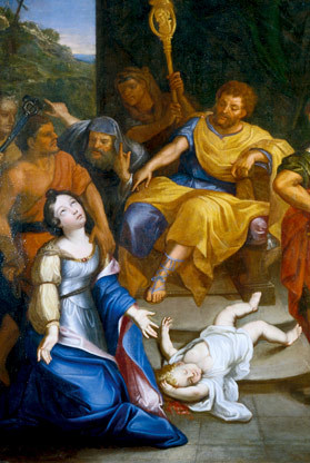 Le martyre de sainte Julitte (tableau anonyme de la 2ème moitié du XVIIe siècle situé dans l'église Saint-Cyr-et-Sainte-Julitte de Villejuif). Son fils saint Cyr est également représenté sur le tableau.